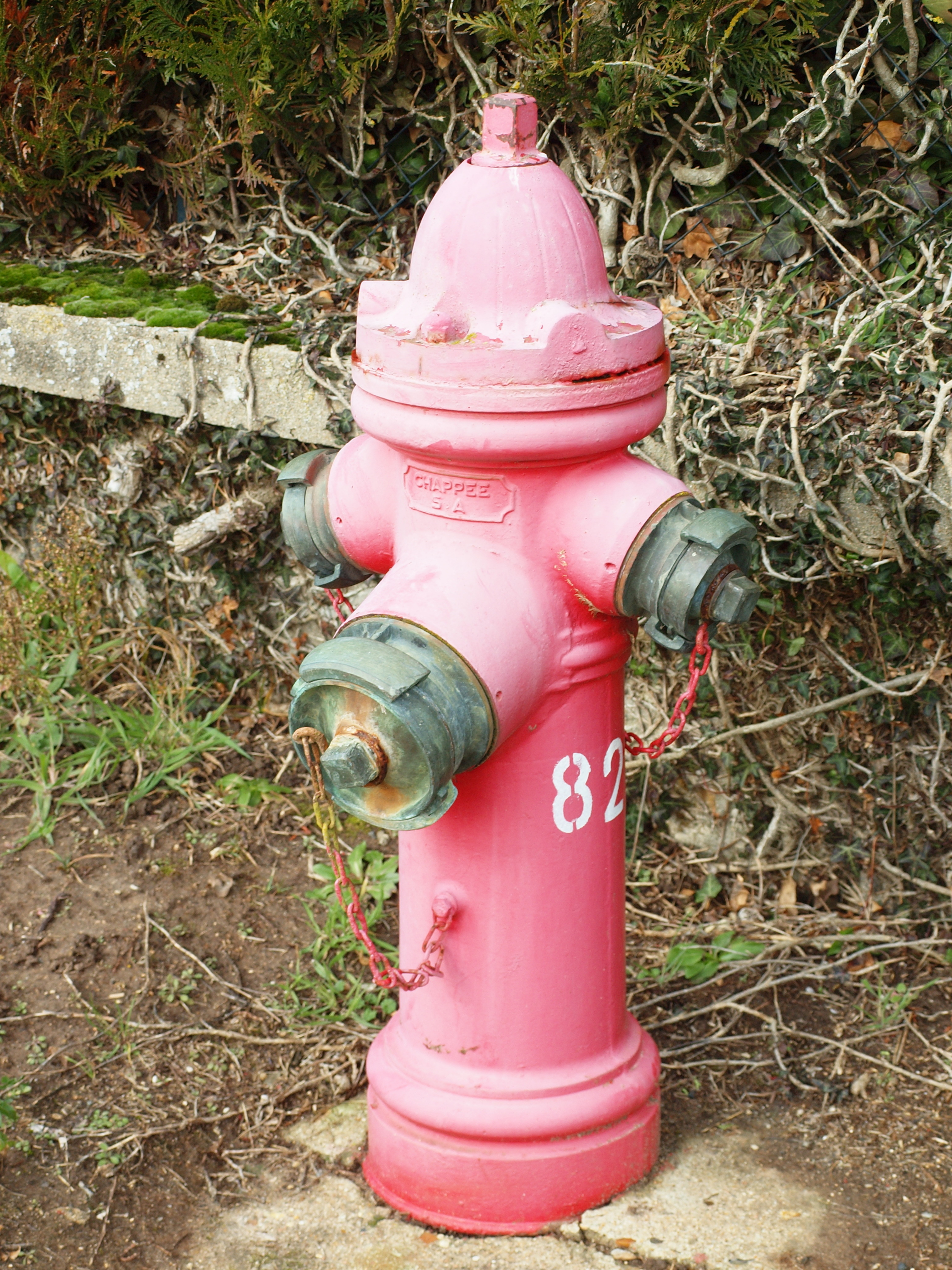 Ceriseaux (Souppes-sur-Loing, Seine-et-Marne, France) ; bouche d'incendie Chappée (modèle 5A)